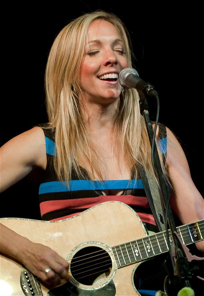 Melanie Dekker Concert in St. James Hall, Vancouver, BC